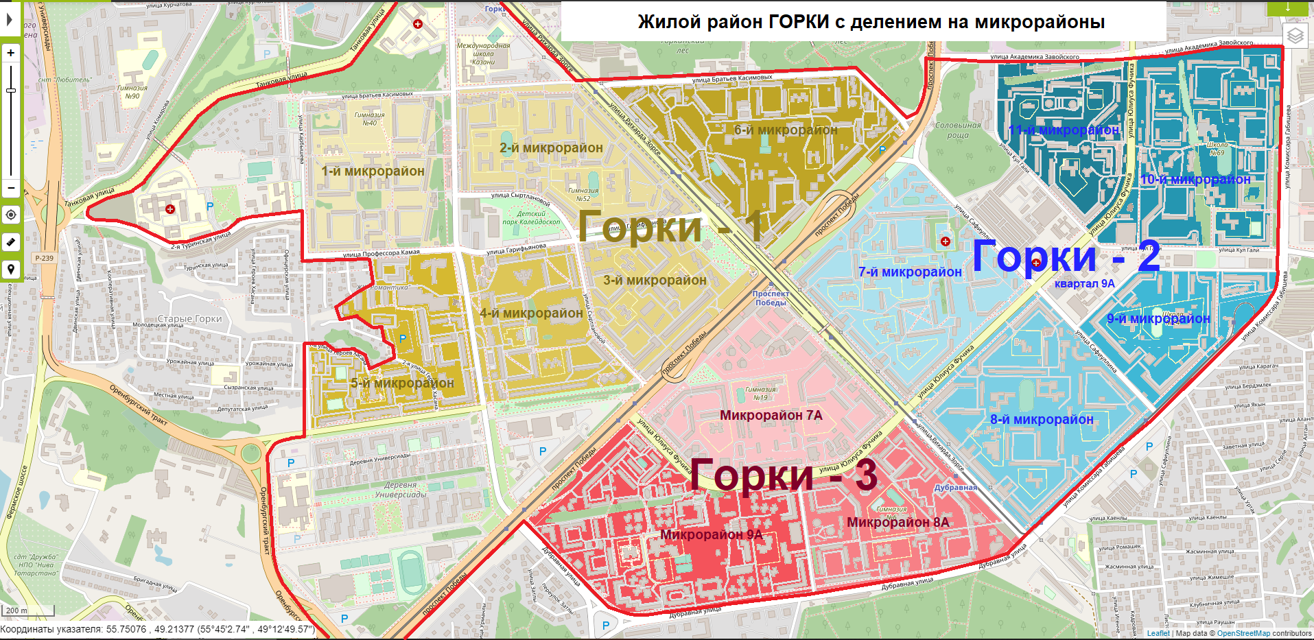 Карта жилого района Горки (Казань) с делением на микрорайоны.